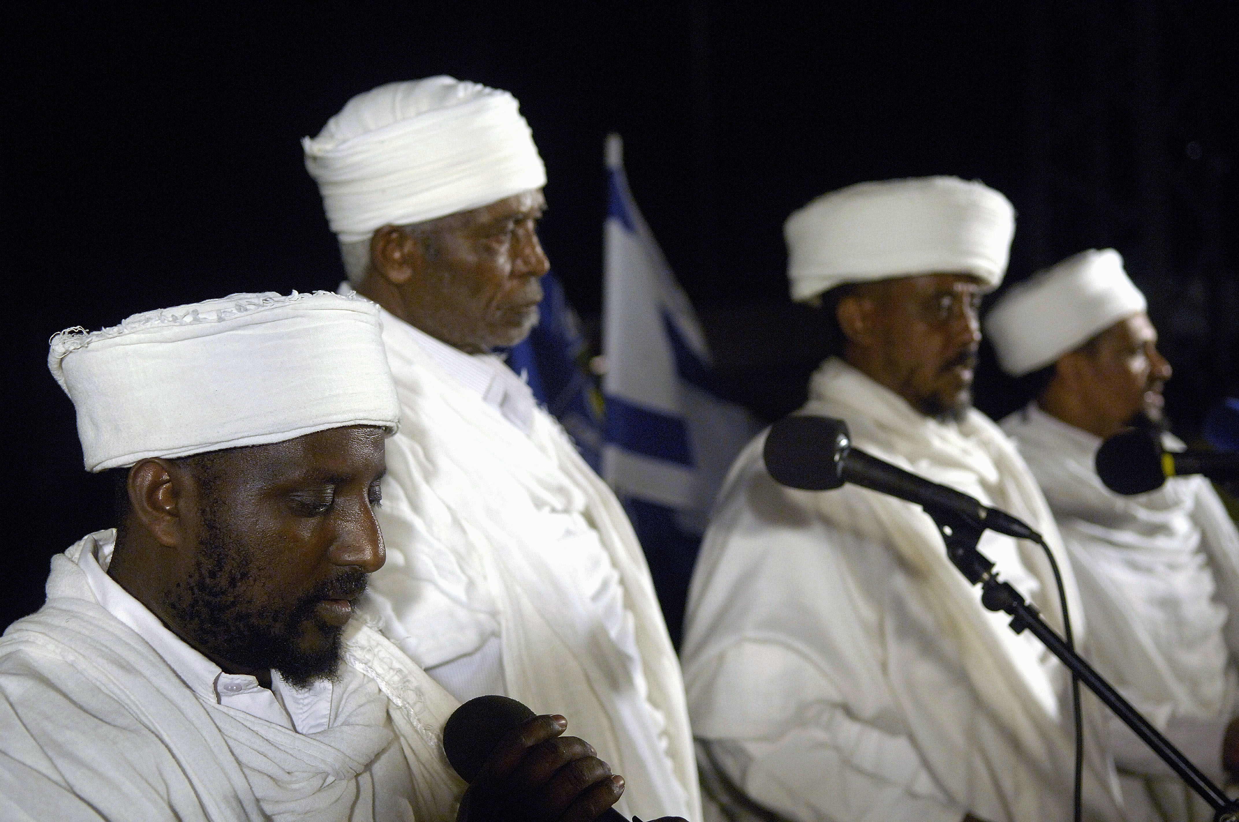 .Kessim saying a prayer for Jews from Ethiopia who perished in Sudan on their way to Israel. Kes Samai Maharat Elias is on the left.